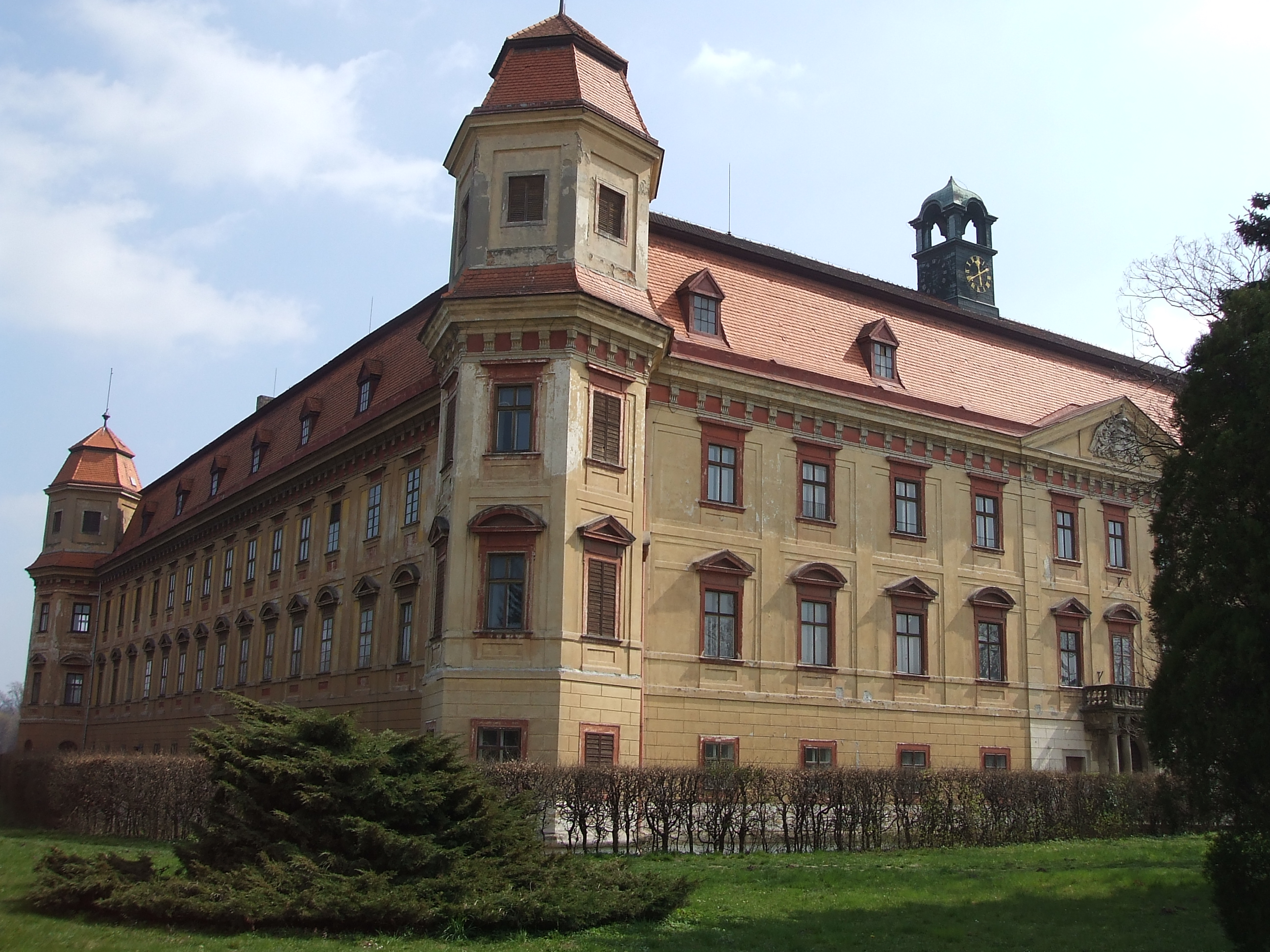 Zámek Holešov, nám. F. X. Richtra 190, Holešov